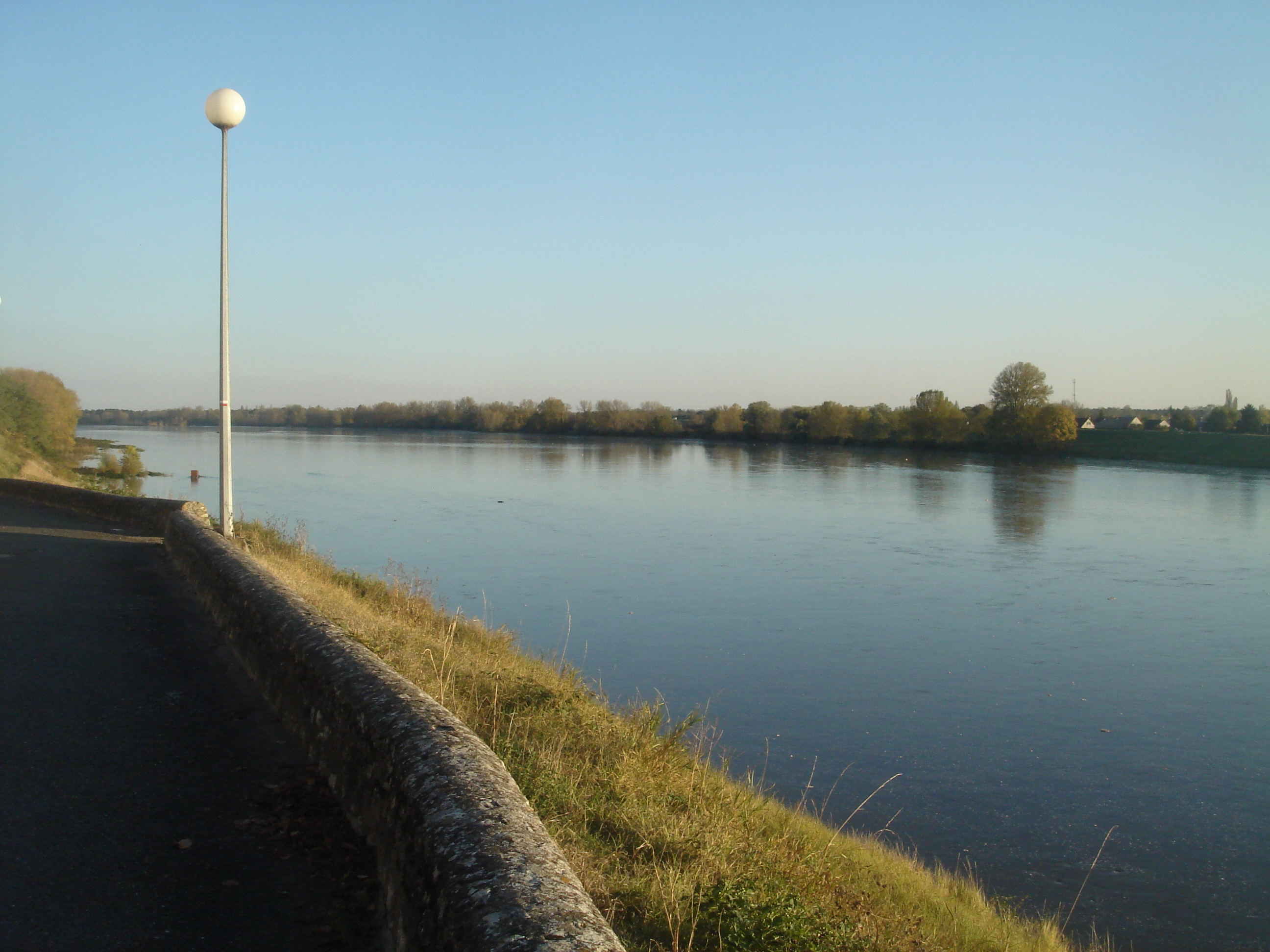 Bord de Loire (rive droite), Saint-Denis-de-l'Hôtel, Loiret, France.